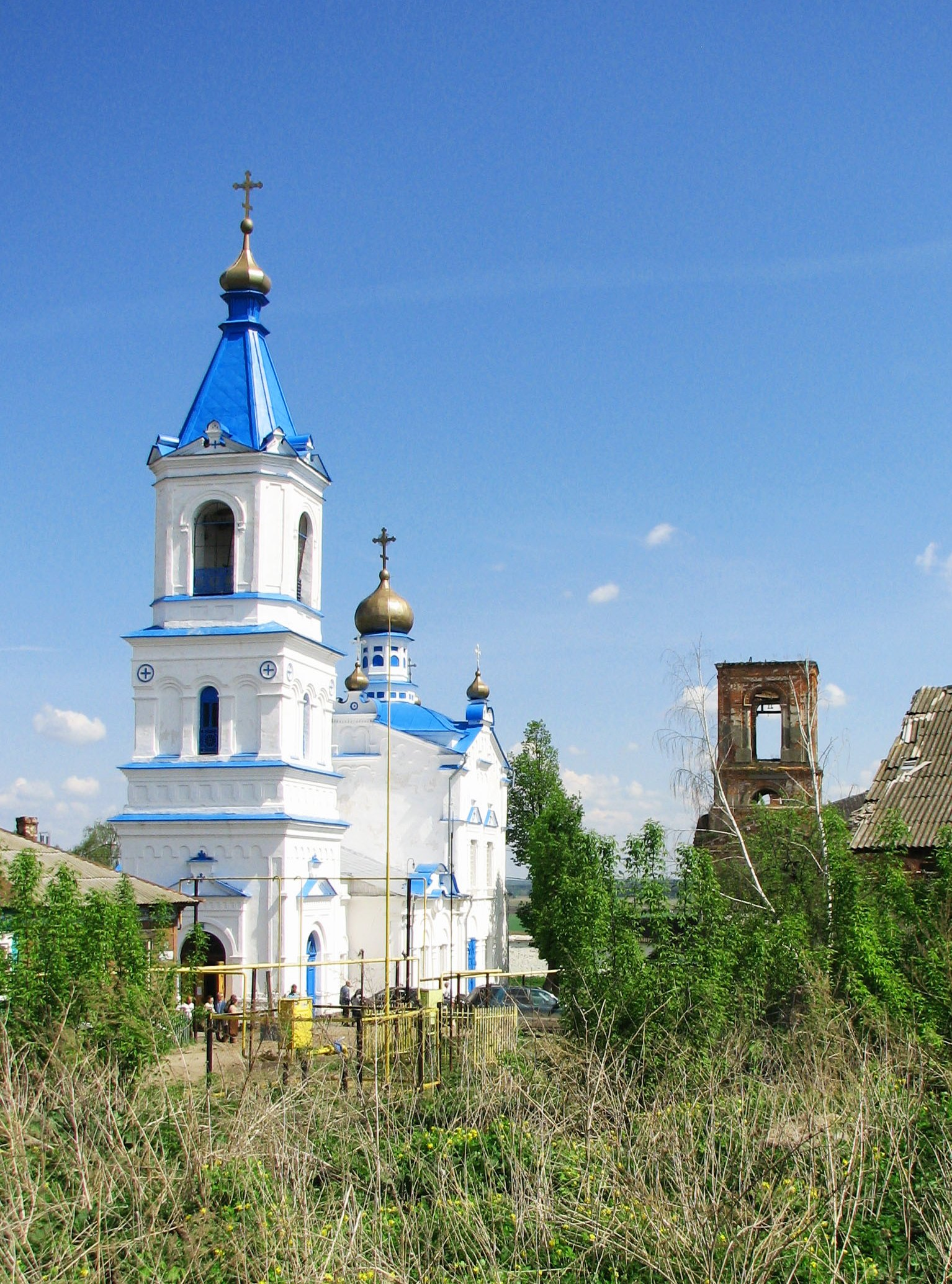 Церковь Рождества Богородицы и Крестовоздвиженский монастырь (Тульская область, Белёв, ул. Музейная, ул. Митрополита Евлогия)